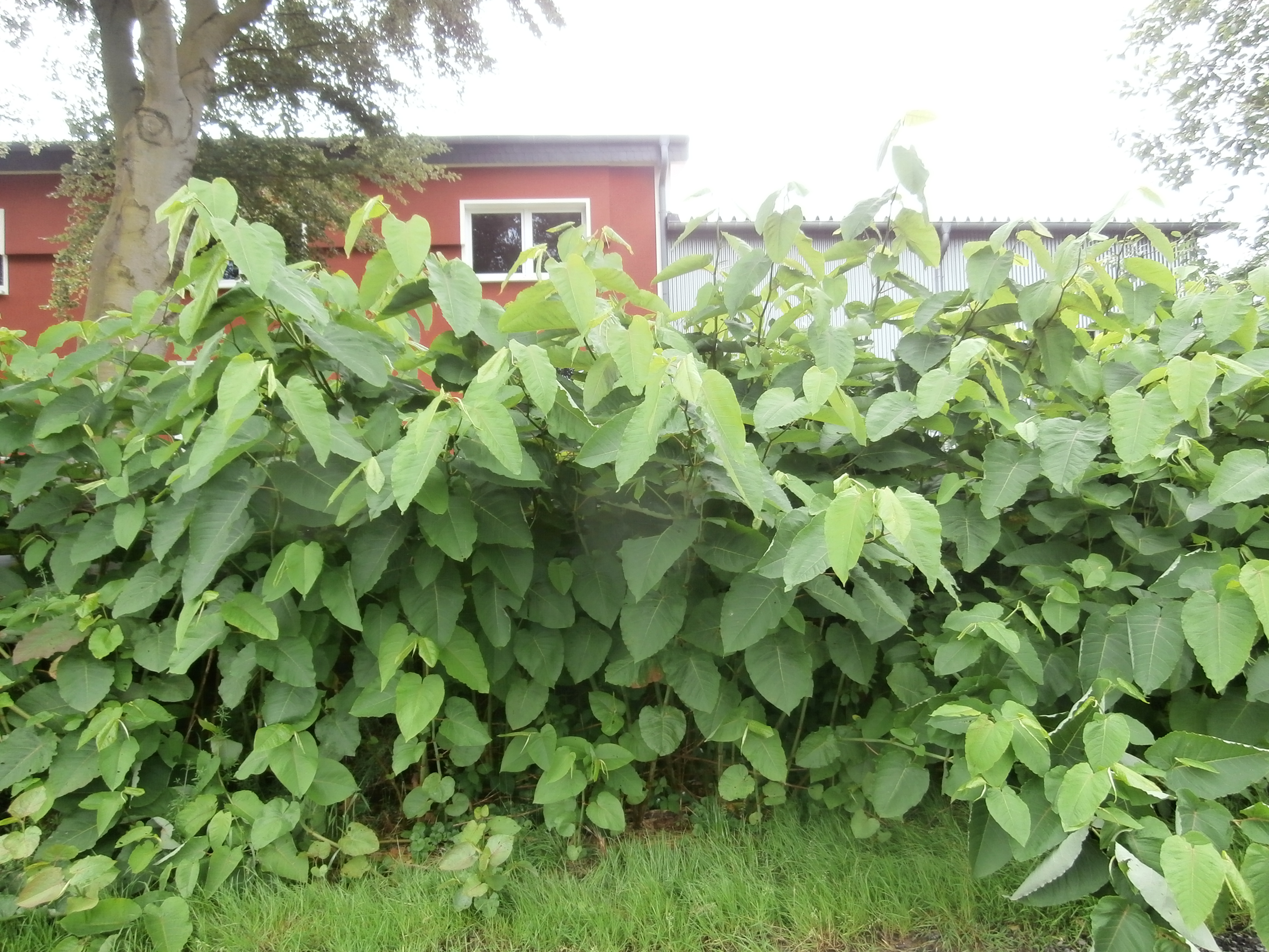 Sachalin-Staudenknoeterich am 3.Juli 2016 Rureifel 550m